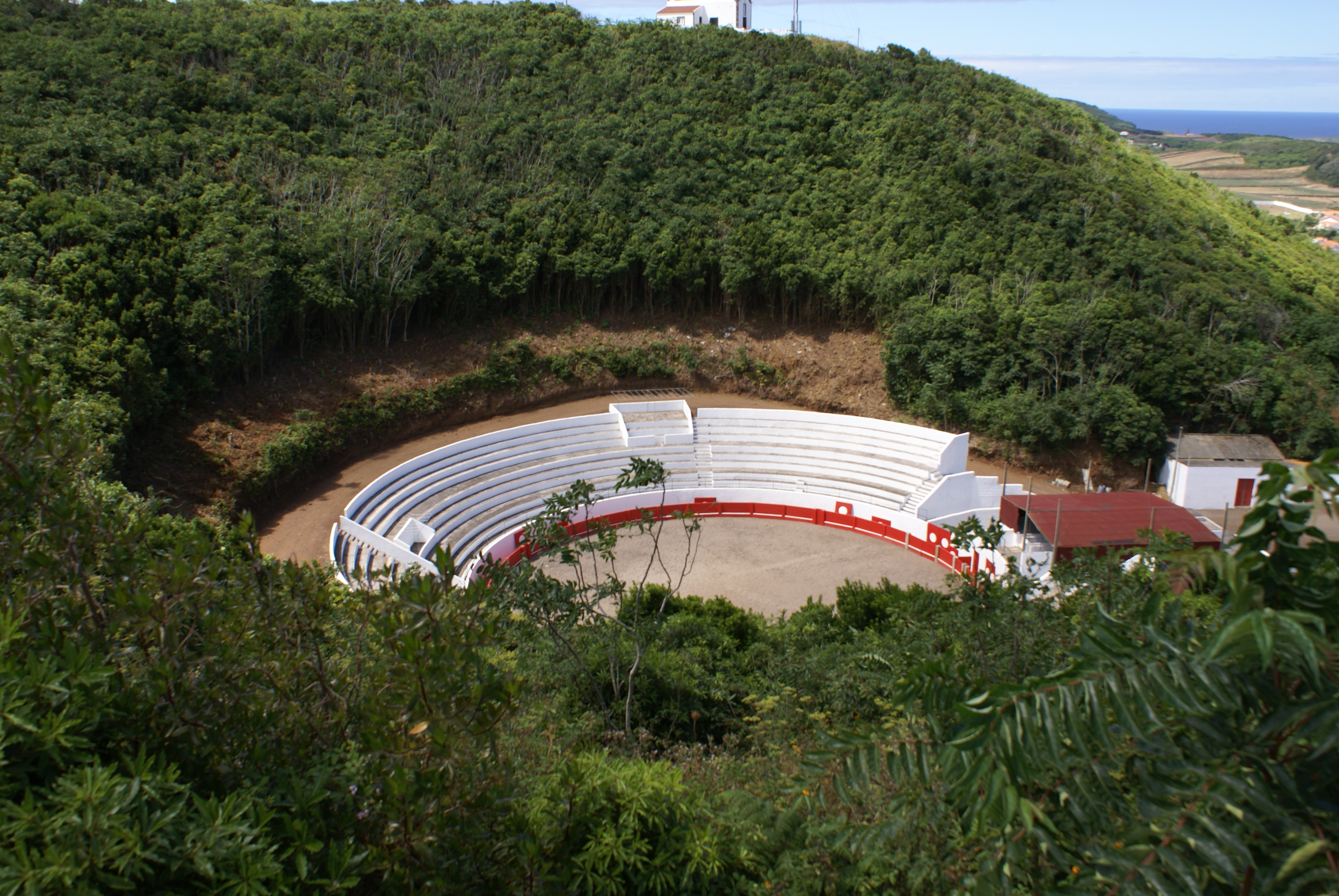 Praça de Touros, Monte da Ajuda, aspecto geral, Santa Cruz da Graciosa, ilha Graciosa, Açores, Portugal